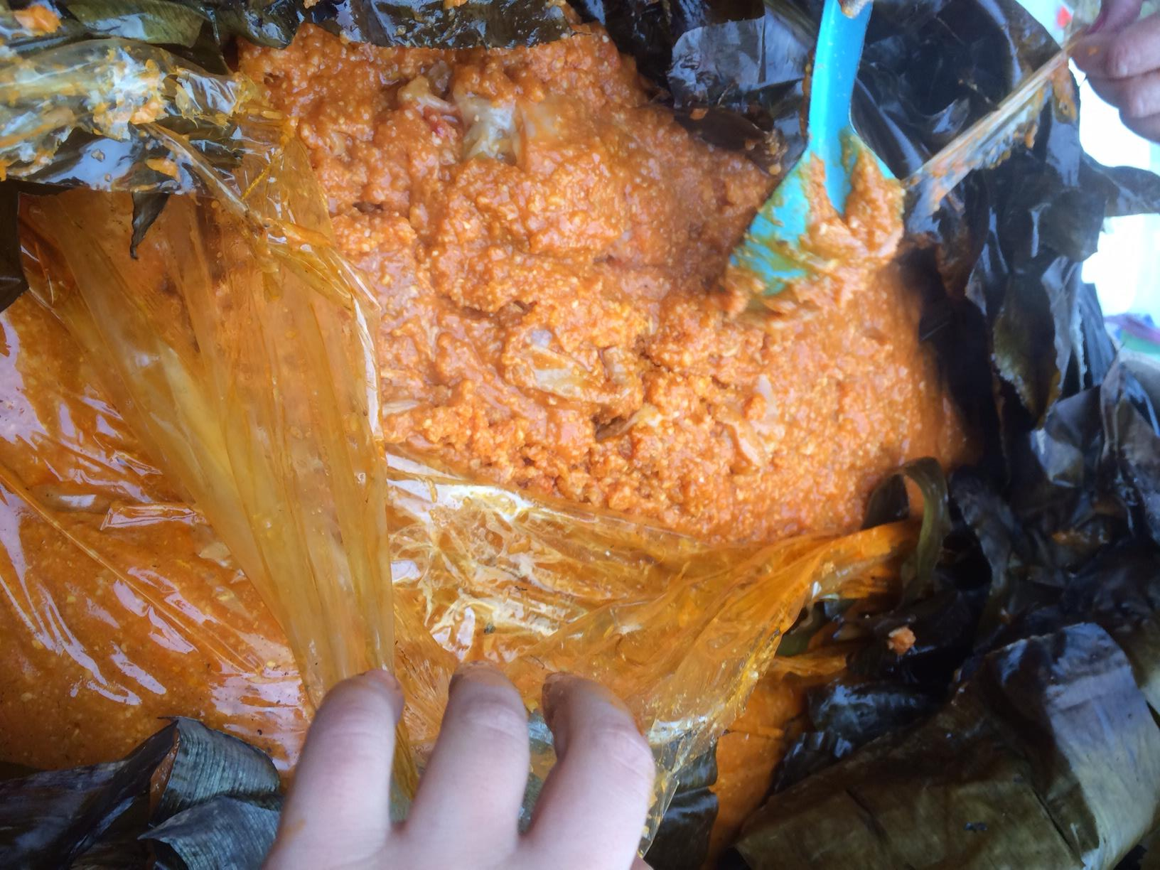 Zacahuil, Tamal tipico de la huasteca